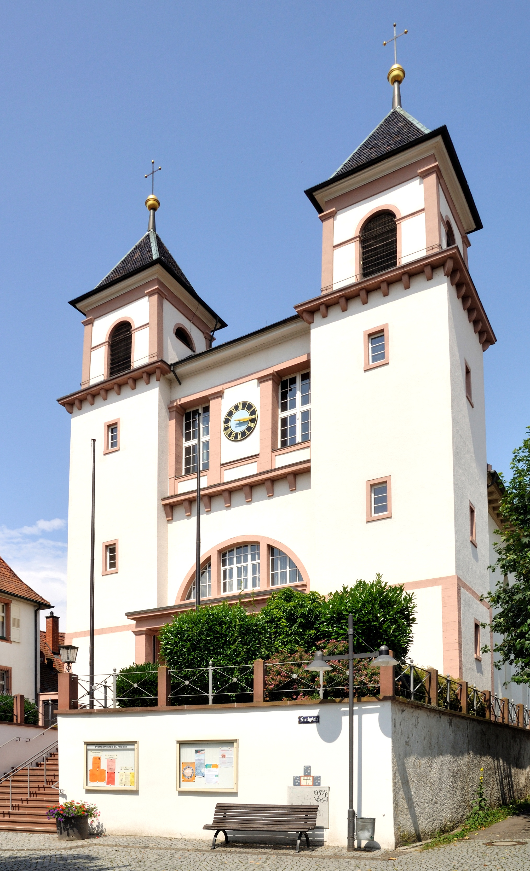 Lörrach: St. Fridolin